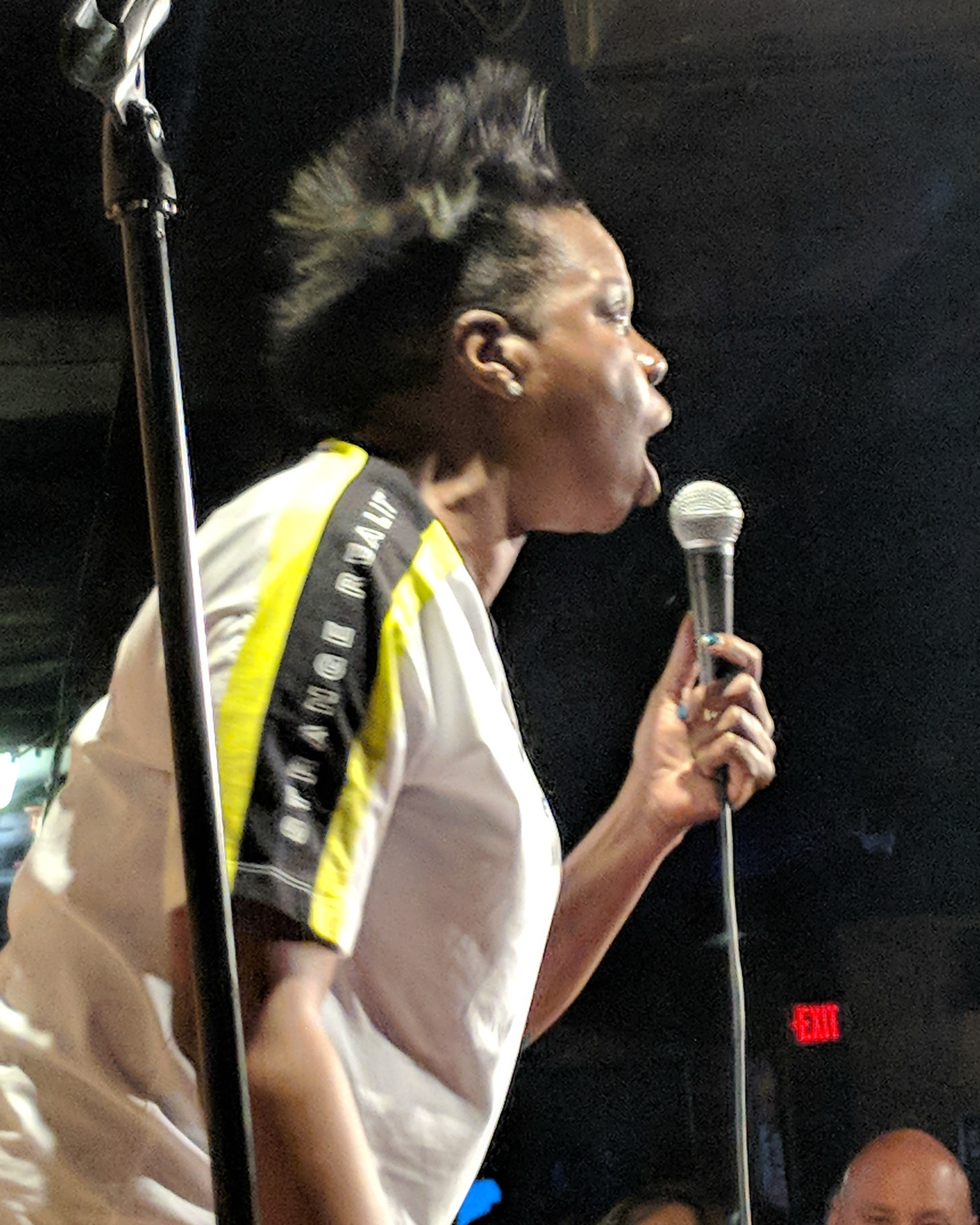 In New Brunswick, NJ